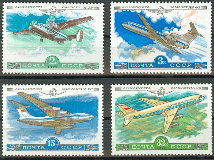 Почтовая марка